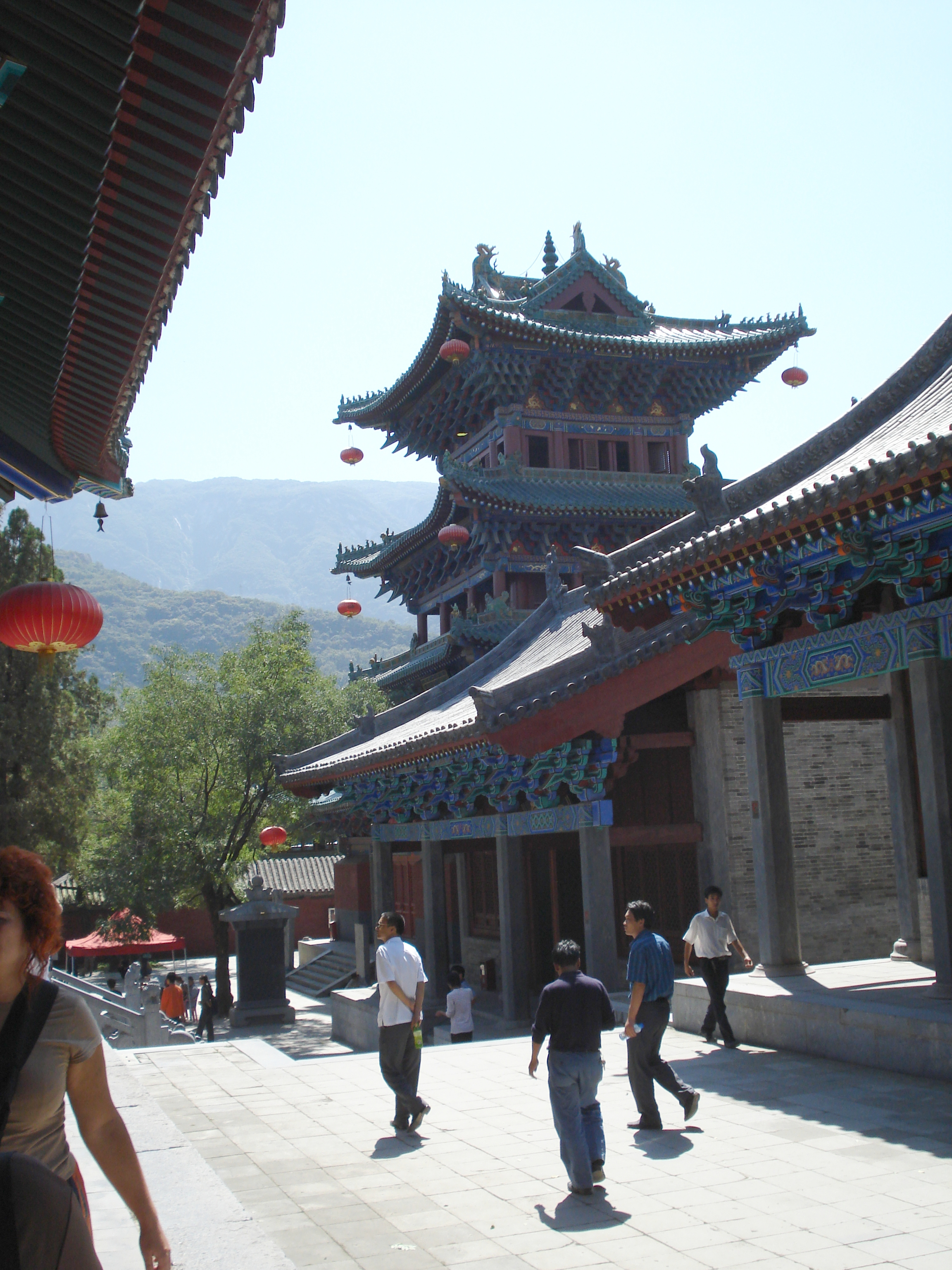 Shaolin